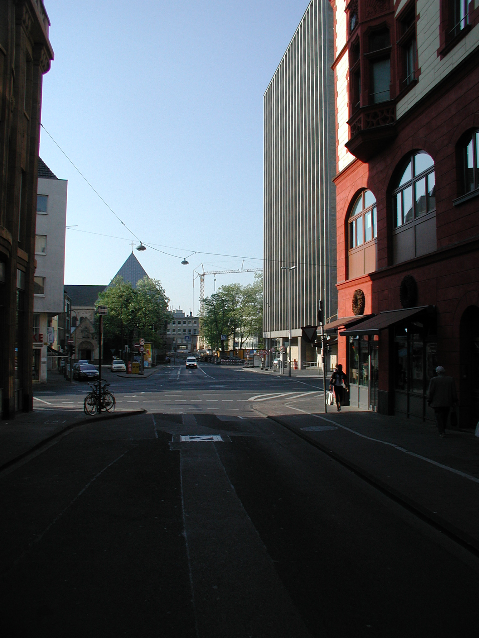 Kölner Bäche (historische Kölner Bachstraßen)